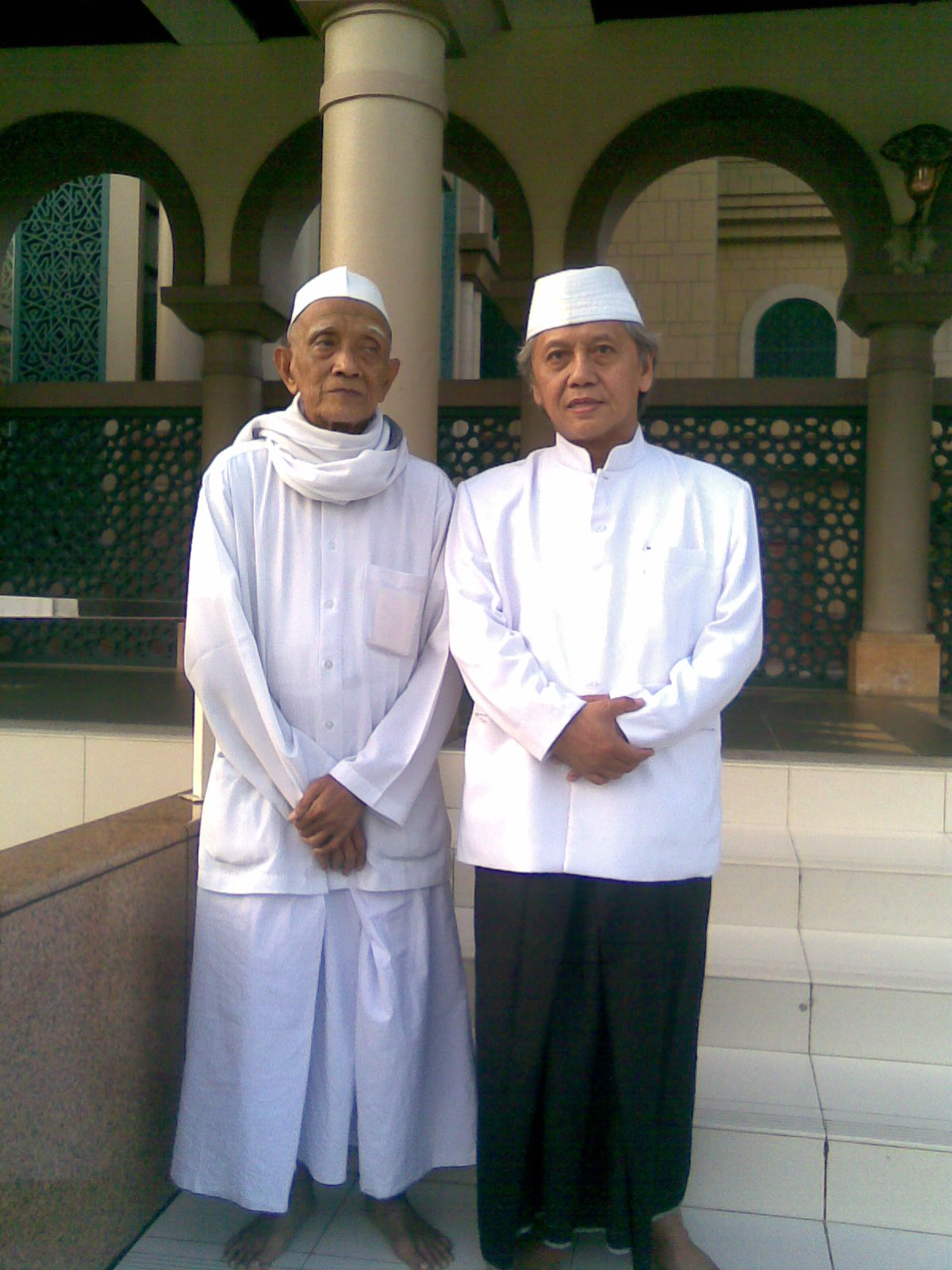 KH. Achmad Chalwani Bersama Syekh Ali bin Abdul Wahab Banjar